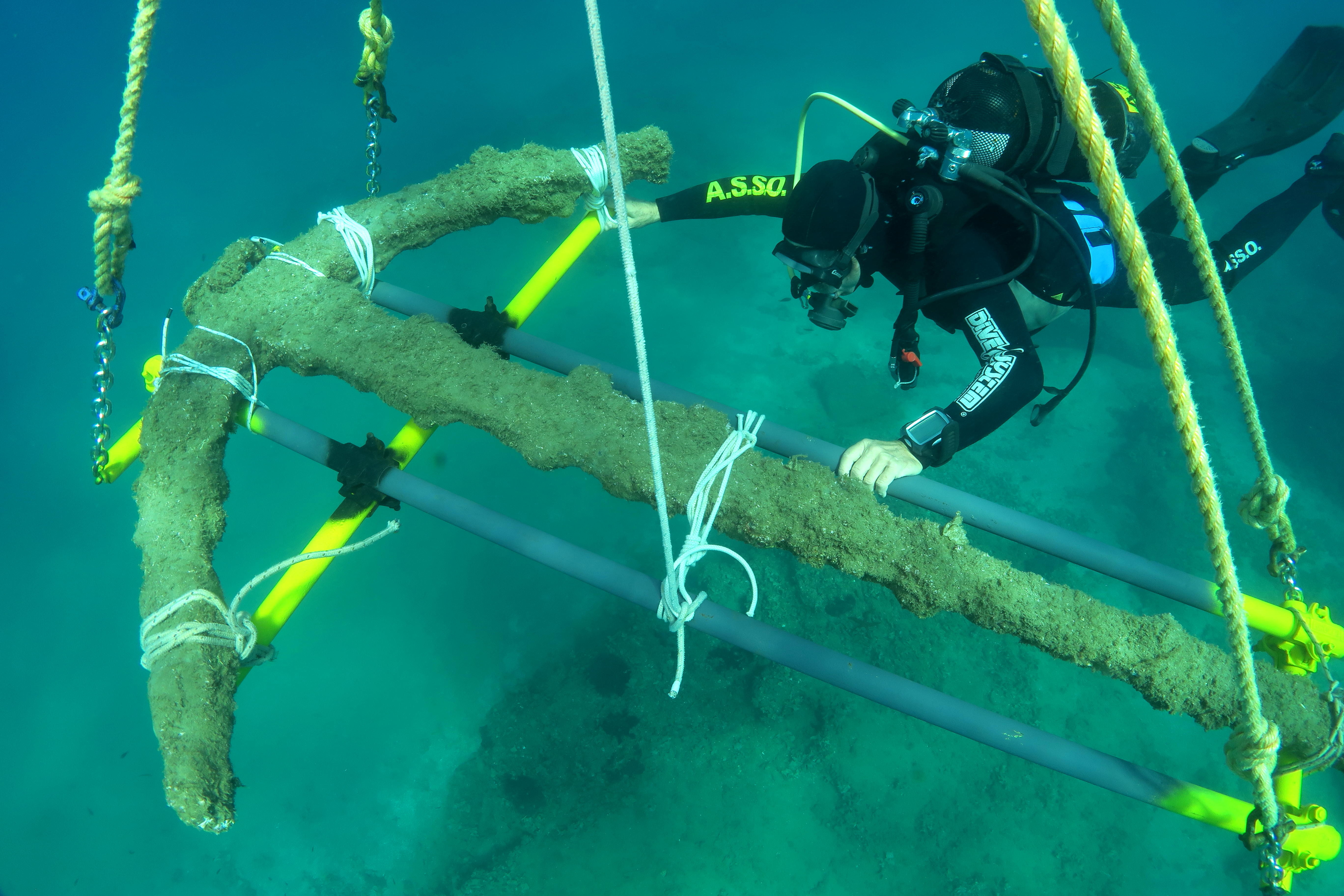 Recupero di un'ancora romana dai fondali del litorale di San Felice Circeo (Roma)